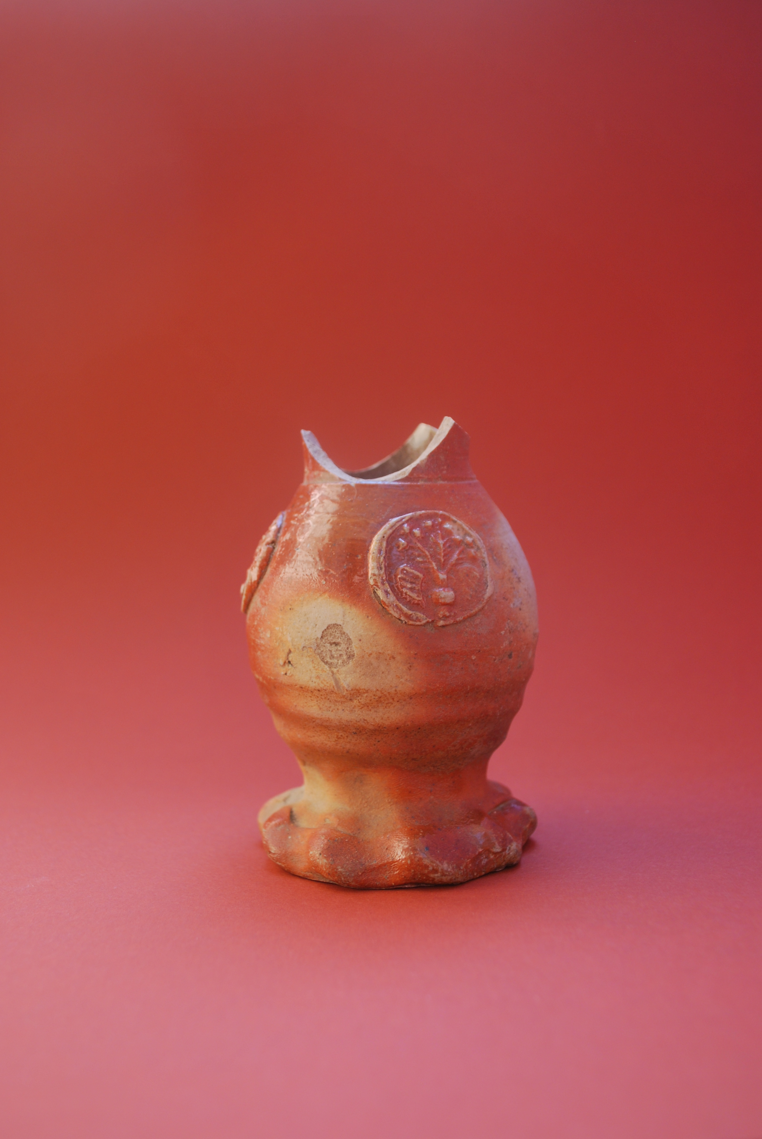 Geflammter Trichterhalsbecher. Siegburger Steinzeug, Ende 14. Jh.